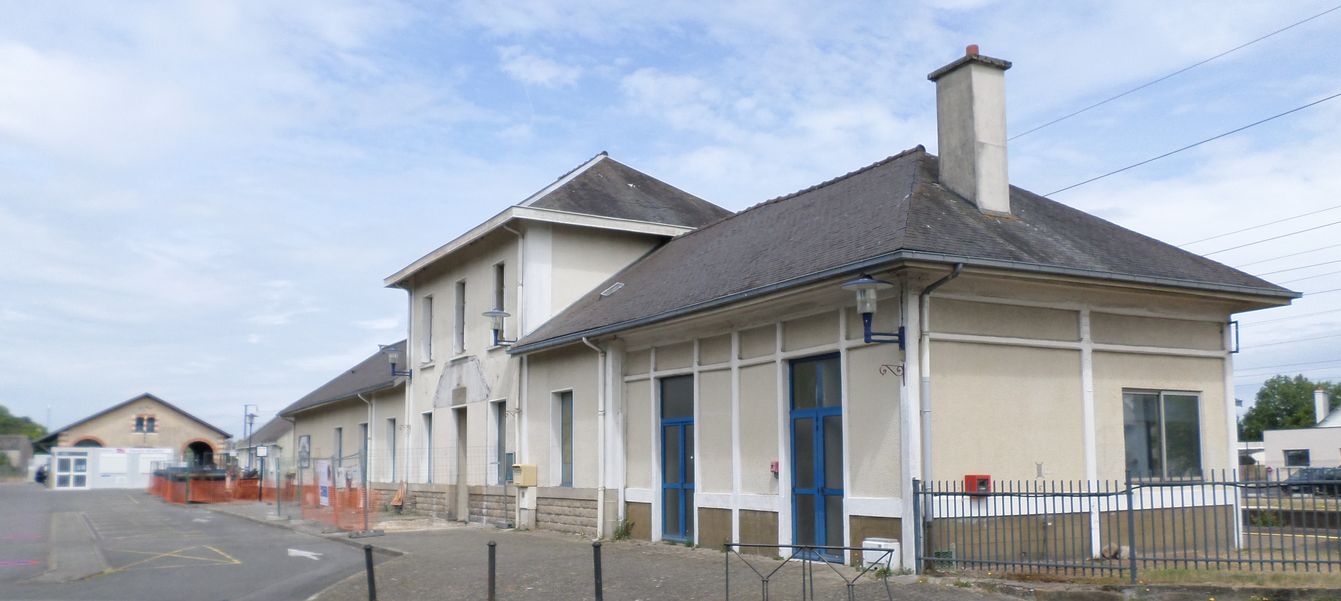 Ti-gar Rosporden, Kerne, Penn-ar-Bed, Breizh